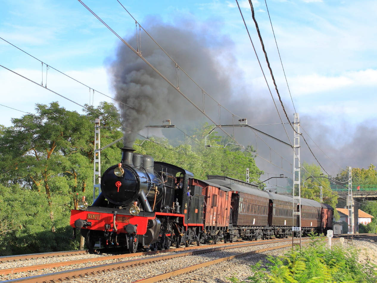 Aranjuez. Tren de la Fresa. Se la dedico a mi buen Amigo el Señor Montepo, por lo simpatico y sincero que es, va por usted. Aranjuez. Tren de la Fresa.